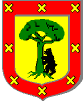 Wappen der Familie Harambure Markgrafenkrone Wappenträger: Schwarze Bären Devise: Keine